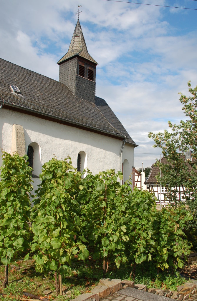 St. Wendelinkapelle in Koisdorf